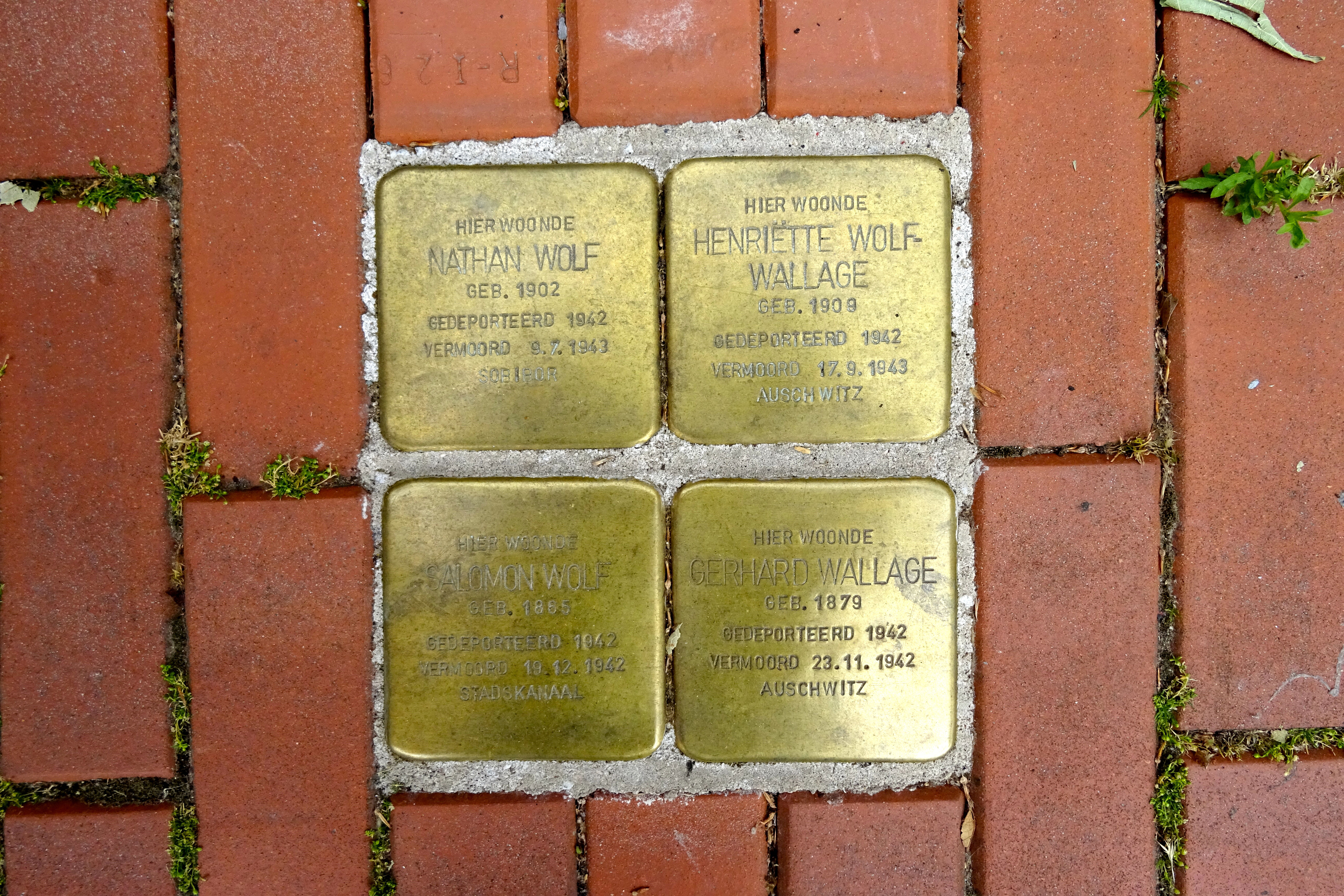 Stolpersteine - Hoofdstraat 29, Stadskanaal: Nathan Wolf, Henriëtte Wolf-Wallage, Salomon Wolf en Gerhard Wallage